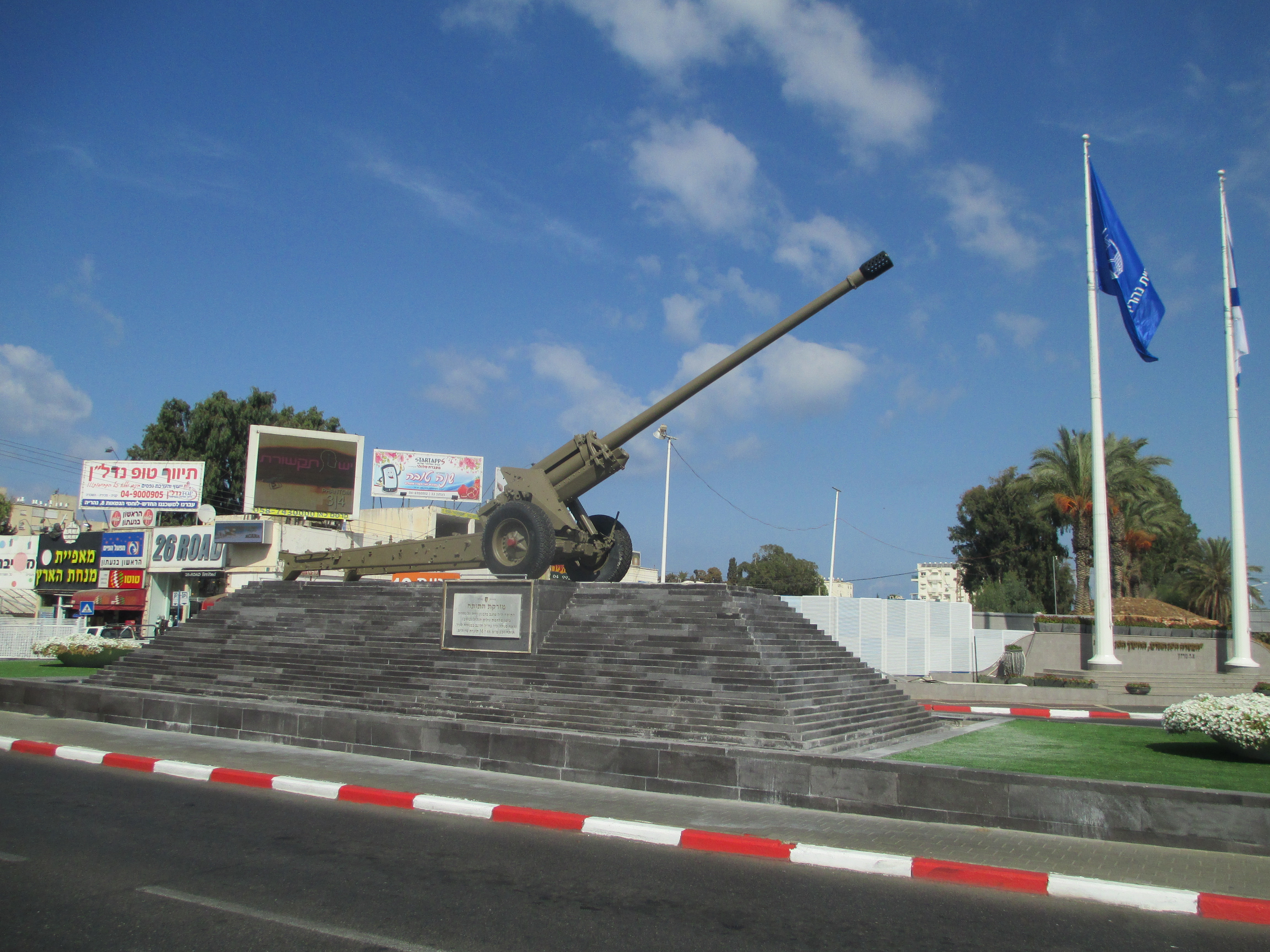 מזרקת התותח בכניסה לנהריה